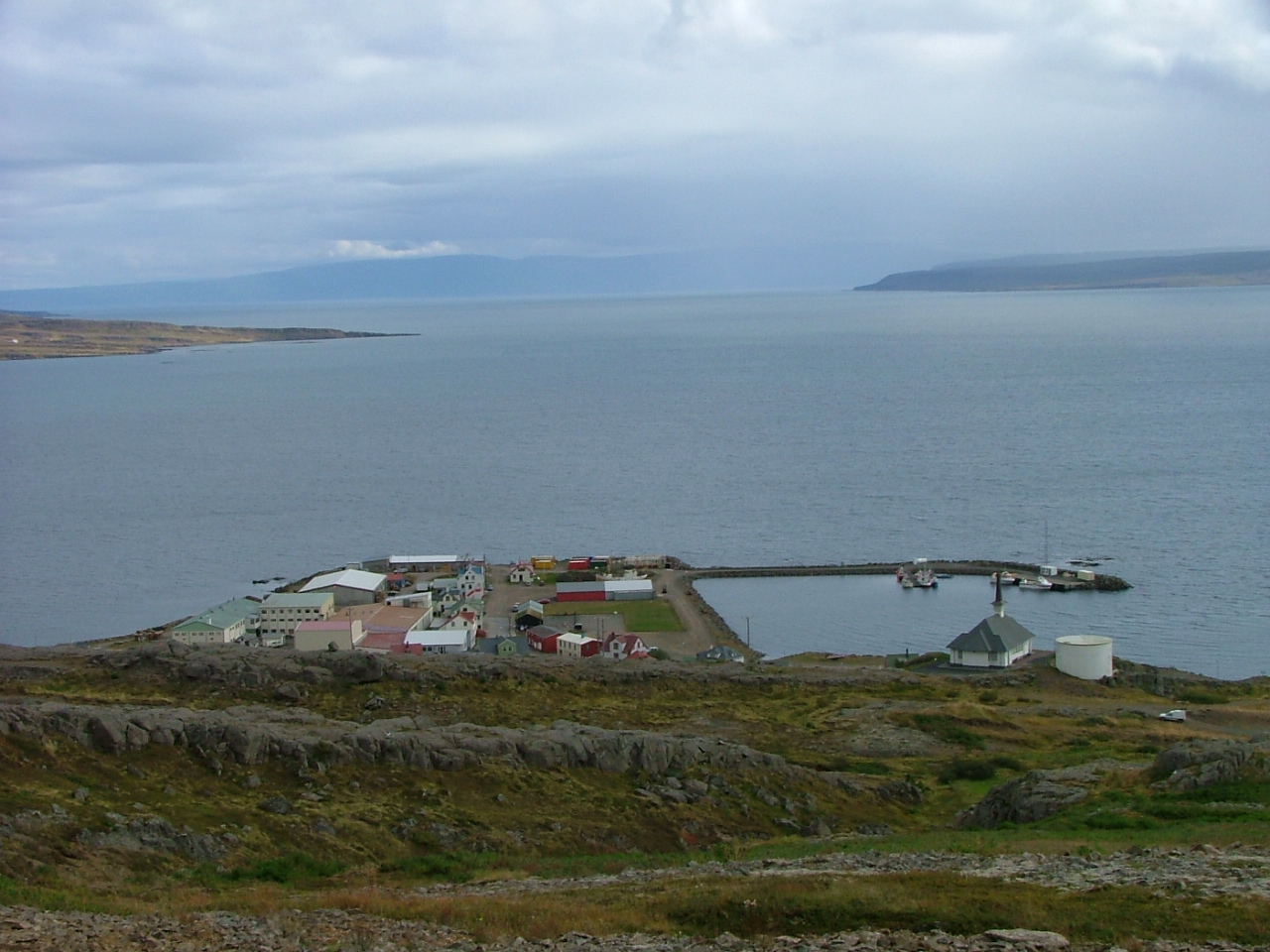 Séð út Steingrímsfjörð yfir Hólmavík ofan af Kálfanesborgum. Ströndin á vinstri hönd (NA) heitir Selströnd og Gálmaströnd heitir ströndin á hægri hönd (SV). Í fjarska handan við Húnaflóa rís Vatnsnes í Húnaþingi.